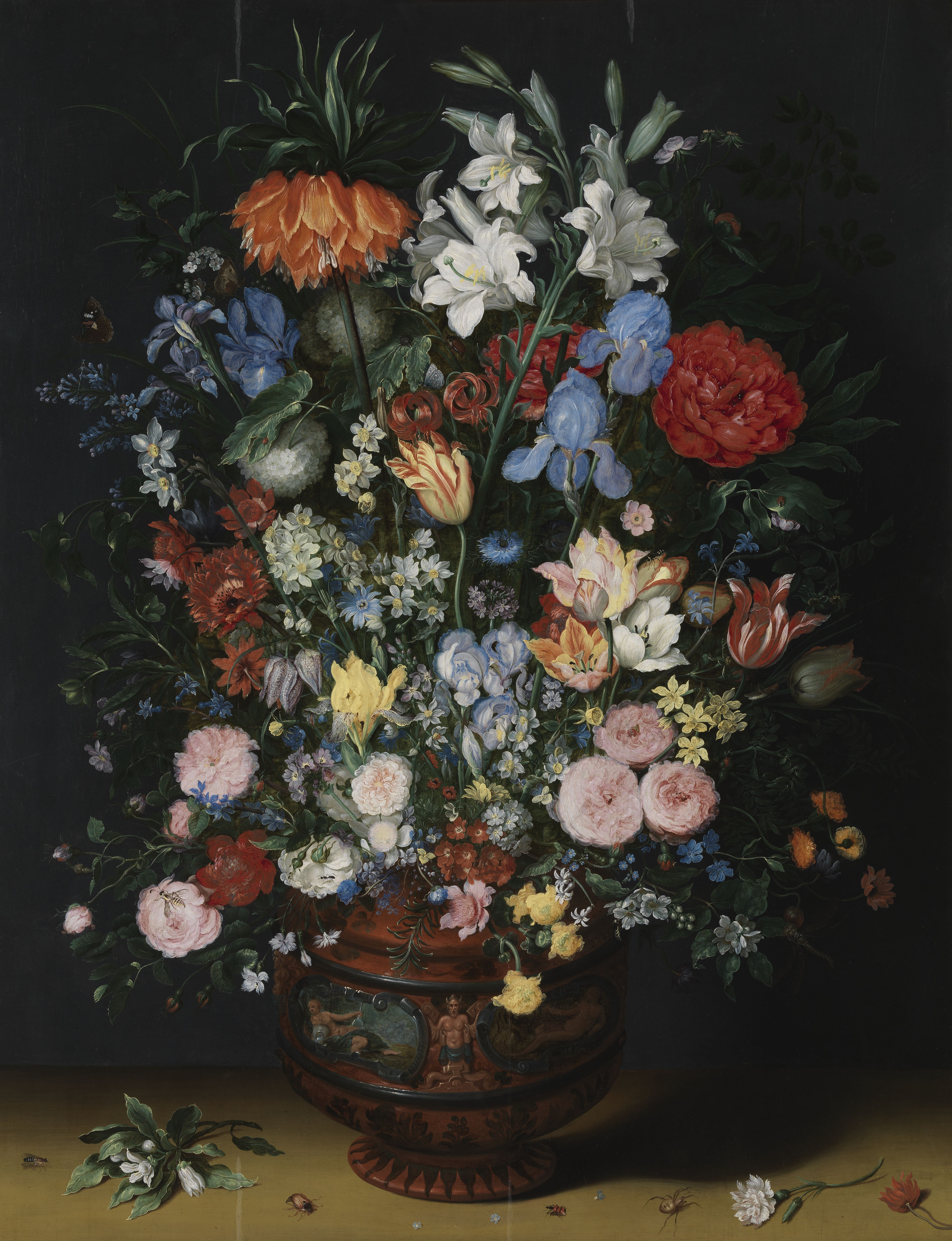 schilderij ( Jan Brueghel I( koninklijk museum voor schone kunsten antwerpen